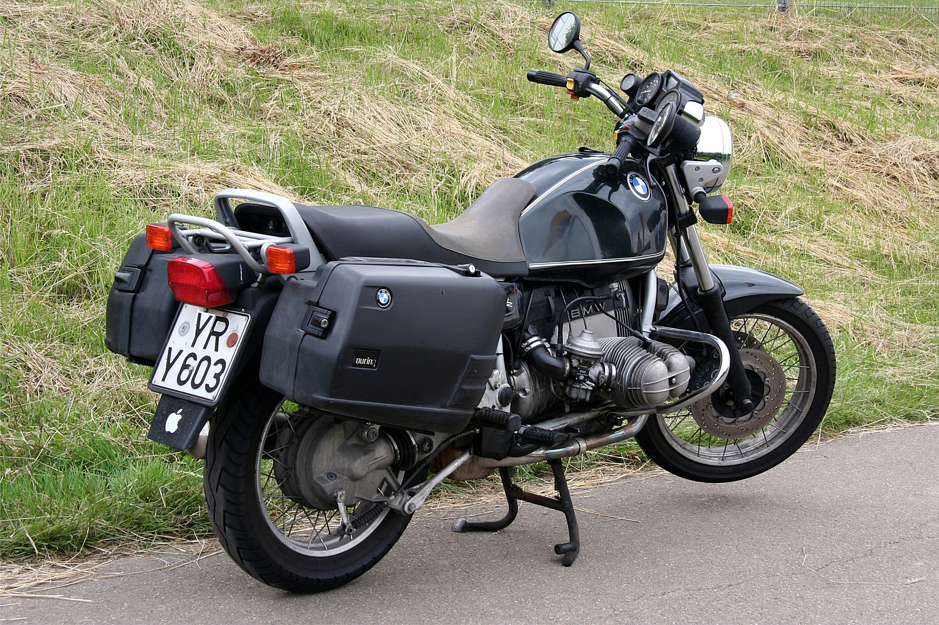 BMW R 100 R